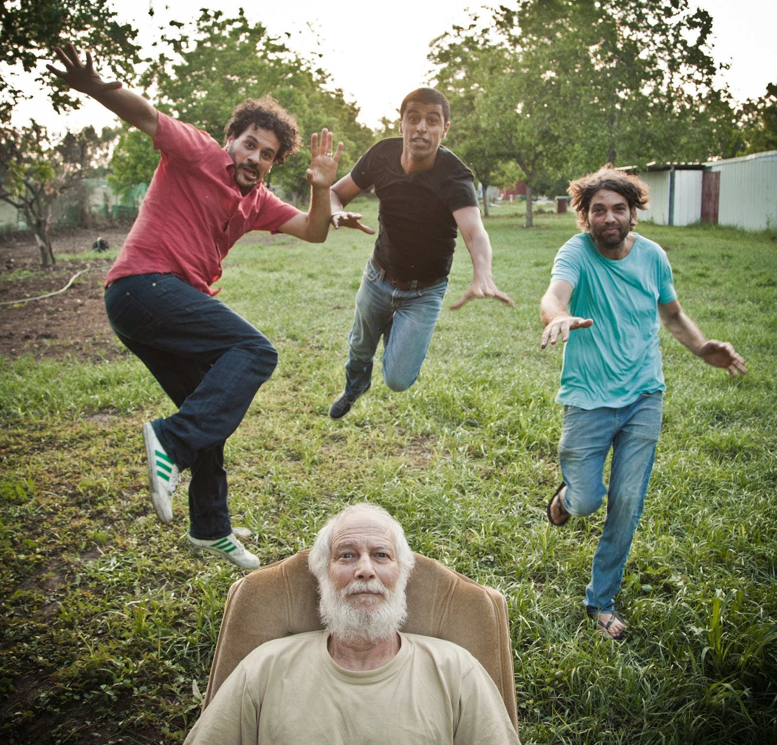 החצר האחורית הוא פרויקט של יענקל'ה רוטבליט אשר חבר אל שלושה יוצרים-מבצעים אשר יחדיו הם יוצרים את "החצר האחורית". חברי הלהקה: גדי רונן, יענקלה רוטבליט, איתמר ציגלר ותומר יוסף.